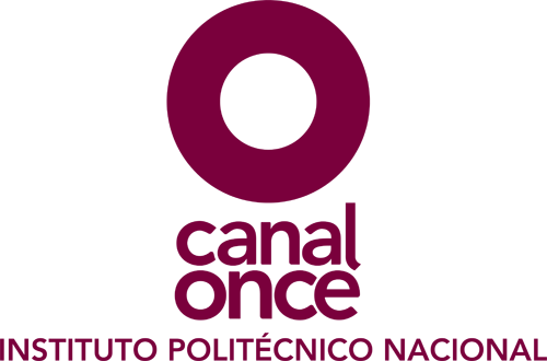 Logo de Canal Once.